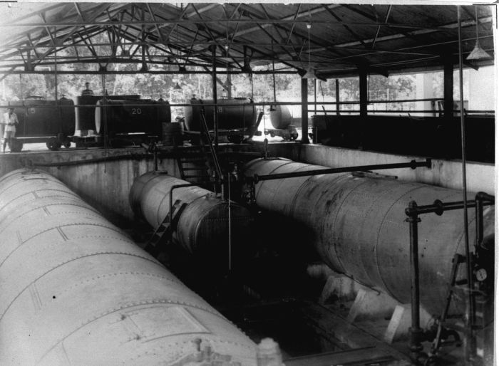 Foto. De overjarige cultures ter oostkust van Sumatra in woord en beeld. Door de A.V.R.O.S. eerbiedig opgedragen aan Z.E. den Gouverneur-Generaal van Nederlandsch-Indië Mr. D. Fock. Latex tanks en tankwagens met sprayed rubber in de rubberfabriek van de United States Rubber Plantations Inc. te Boenoet, Oost-Sumatra, ca. 1925.